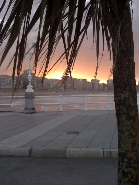 playa de San Lorenzo